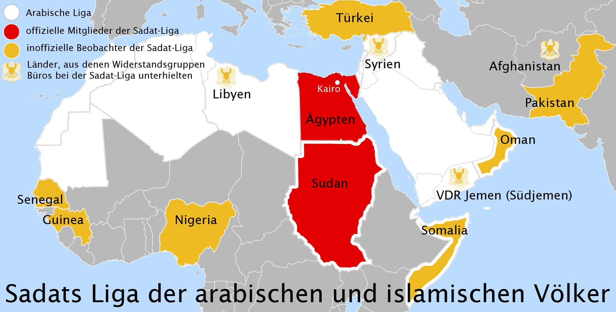 Sadats "Liga der arabischen und islamischen Völker" (1980-1983)Weiß und weiß umrandet - Arabische LigaRot - offizielle Mitglieder der Sadat-Liga (Ägypten und Sudan)Gold - inoffizielle Beobachter der Sadat-LigaFalke - Staaten, aus denen Widerstandsgruppen Büros bei der Sadat-Liga unterhielten